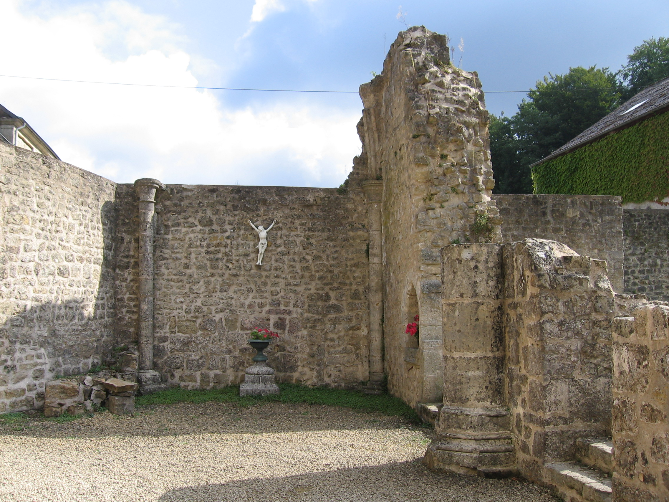 Absidiole de l'ancienne abbatiale (en ruines) de l'abbaye de Clairefontaine, près d'Arlon (Belgique).